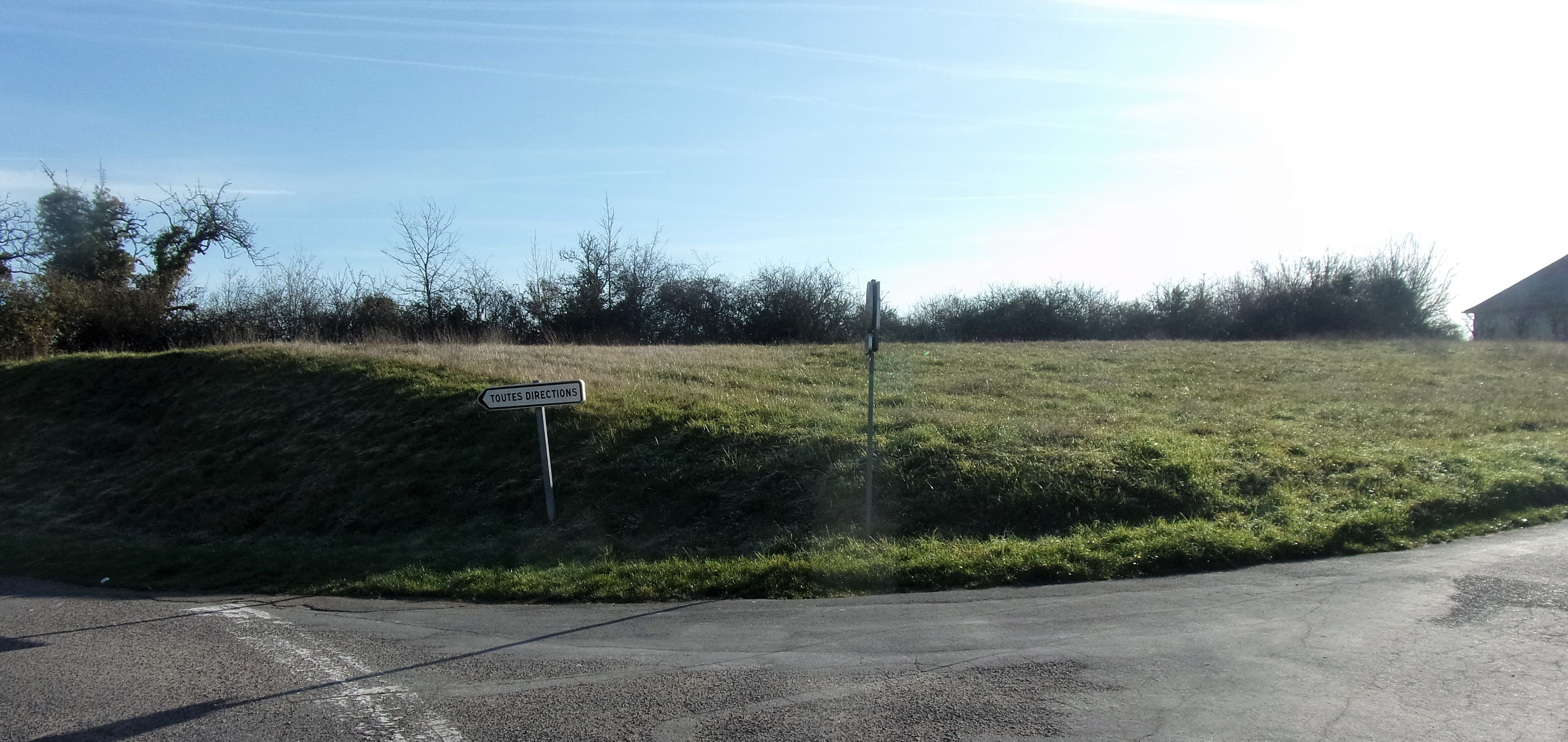 Rempart gaulois des Châteliers (Amboise). Vue vers le sud-est